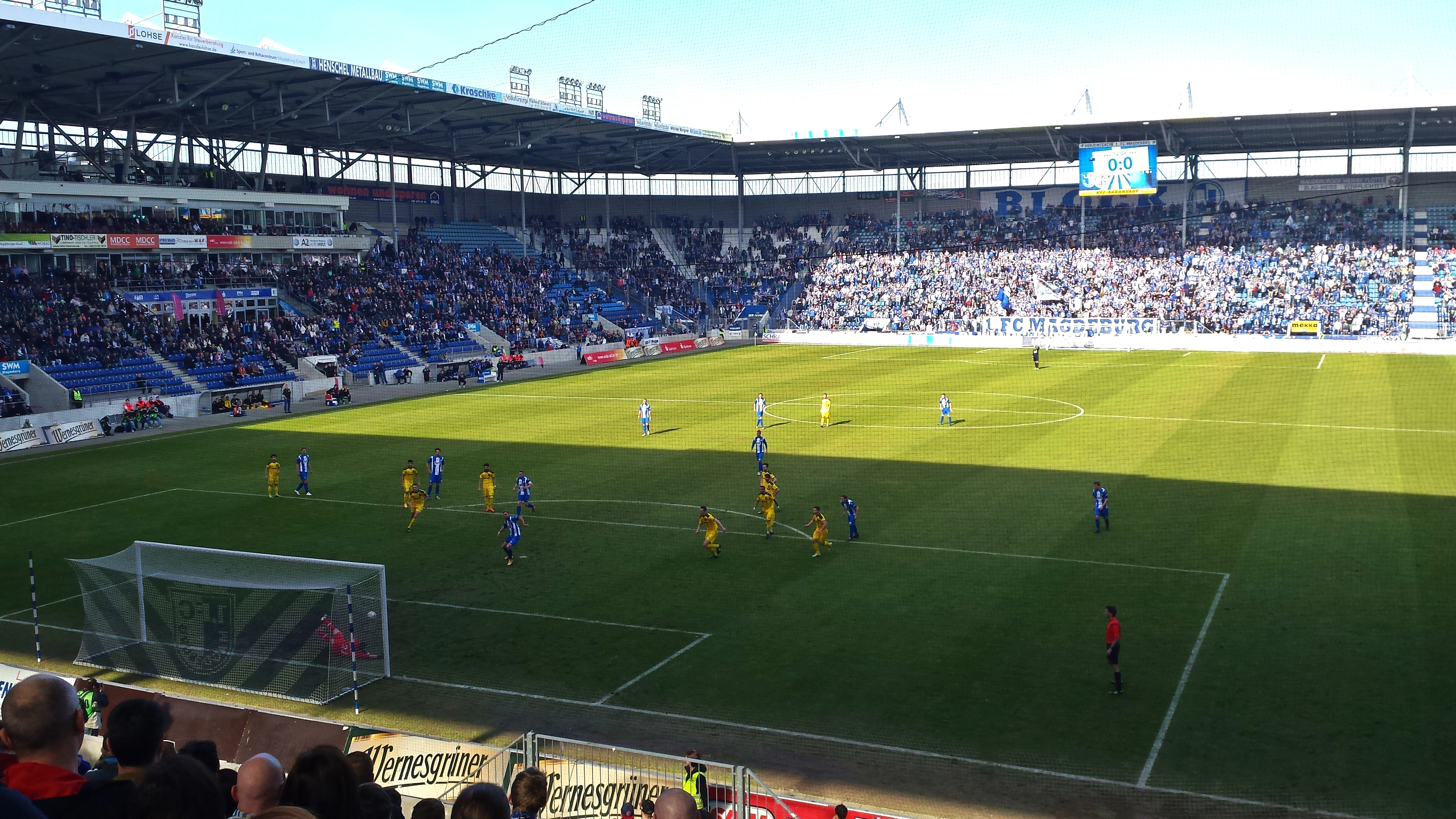 Heimspiel 1. FC Magdeburg in der MDCC-Arena gegen den VFC Plauen